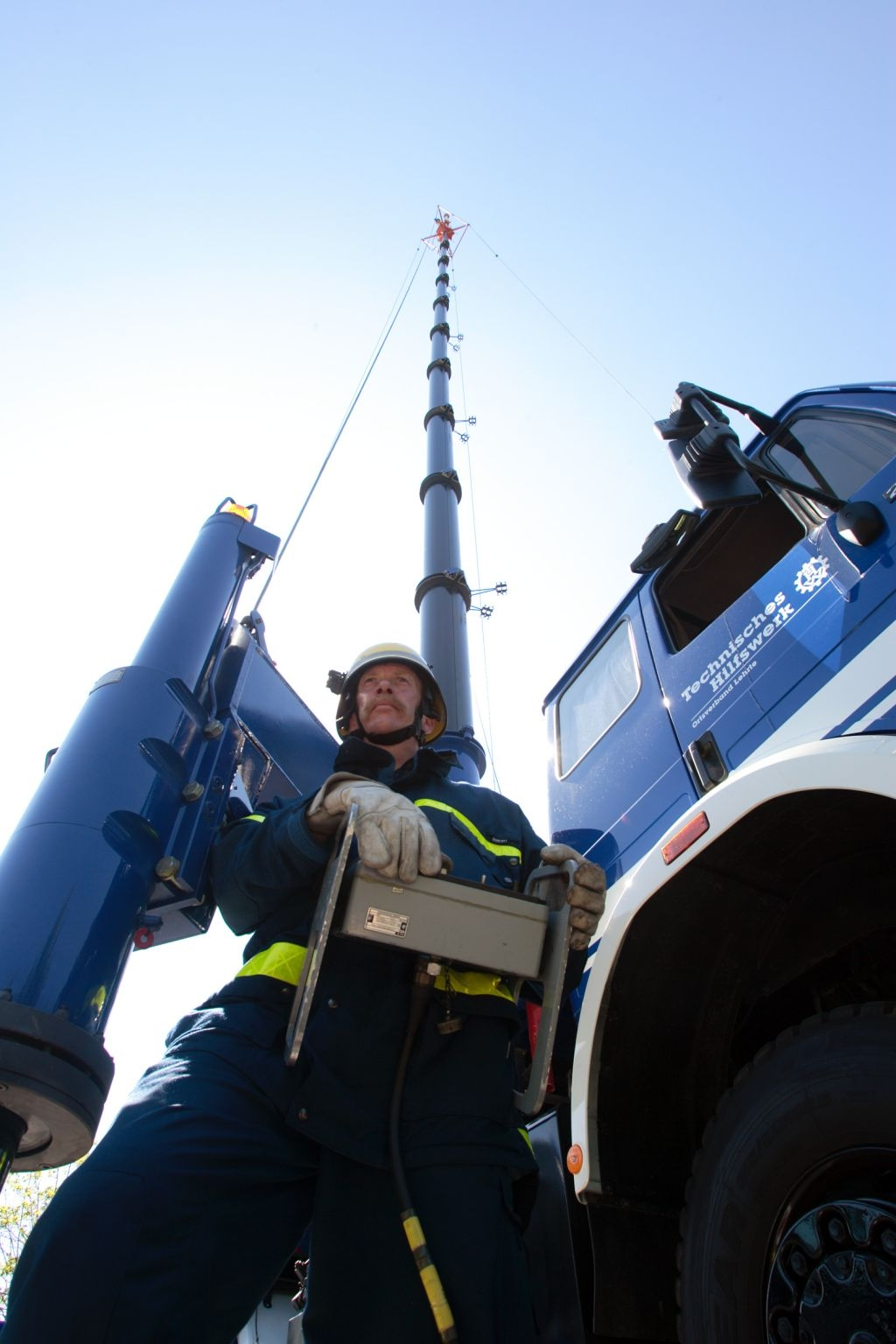 Inhalt: Fachgruppe Führung/Kommunikation des Technischen Hilfswerks Urheber / Genehmigung: Bundesanstalt Technisches Hilfswerk Presse- und Öffentlichkeitsarbeit Provinzialstraße 93 53127 Bonn